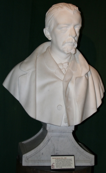 Busto di Gabriele Camozzi (1823-1869) presso il museo Storico di Bergamo